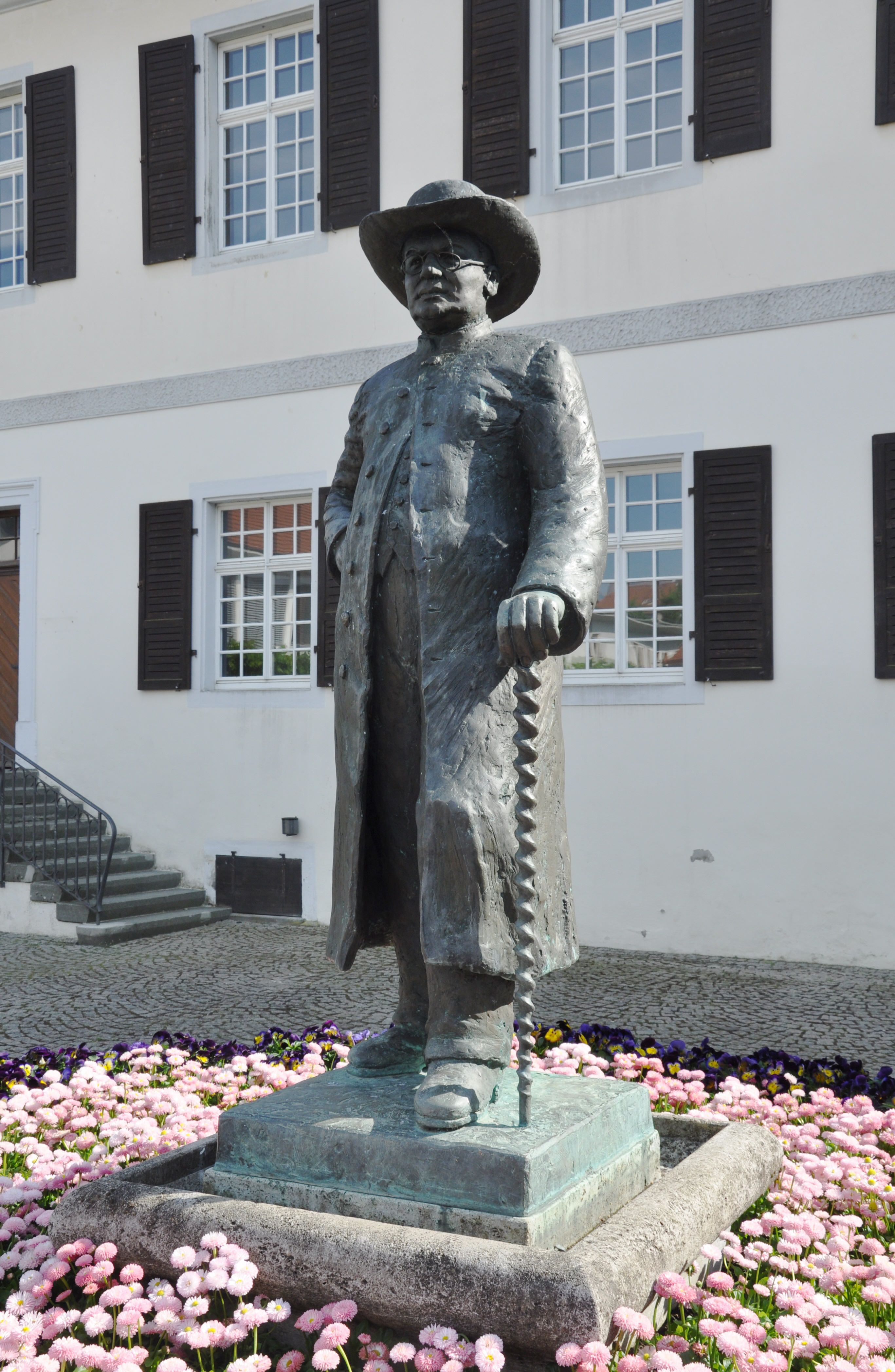 Hagnau am Bodensee, Hansjakob-Denkmal beim Rathaus